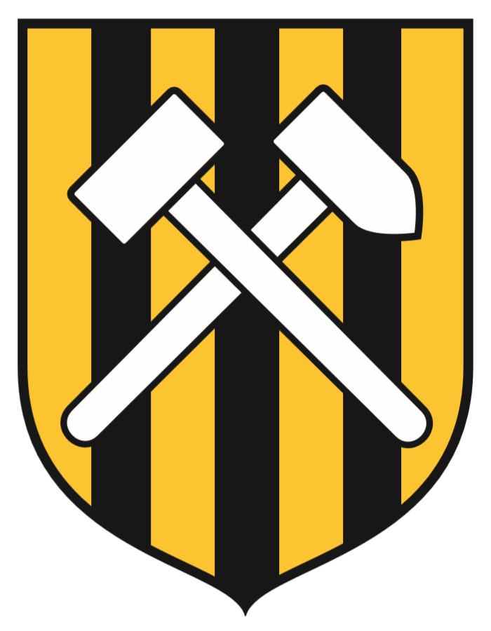 Wappen der Stadt Pockau-Lengefeld